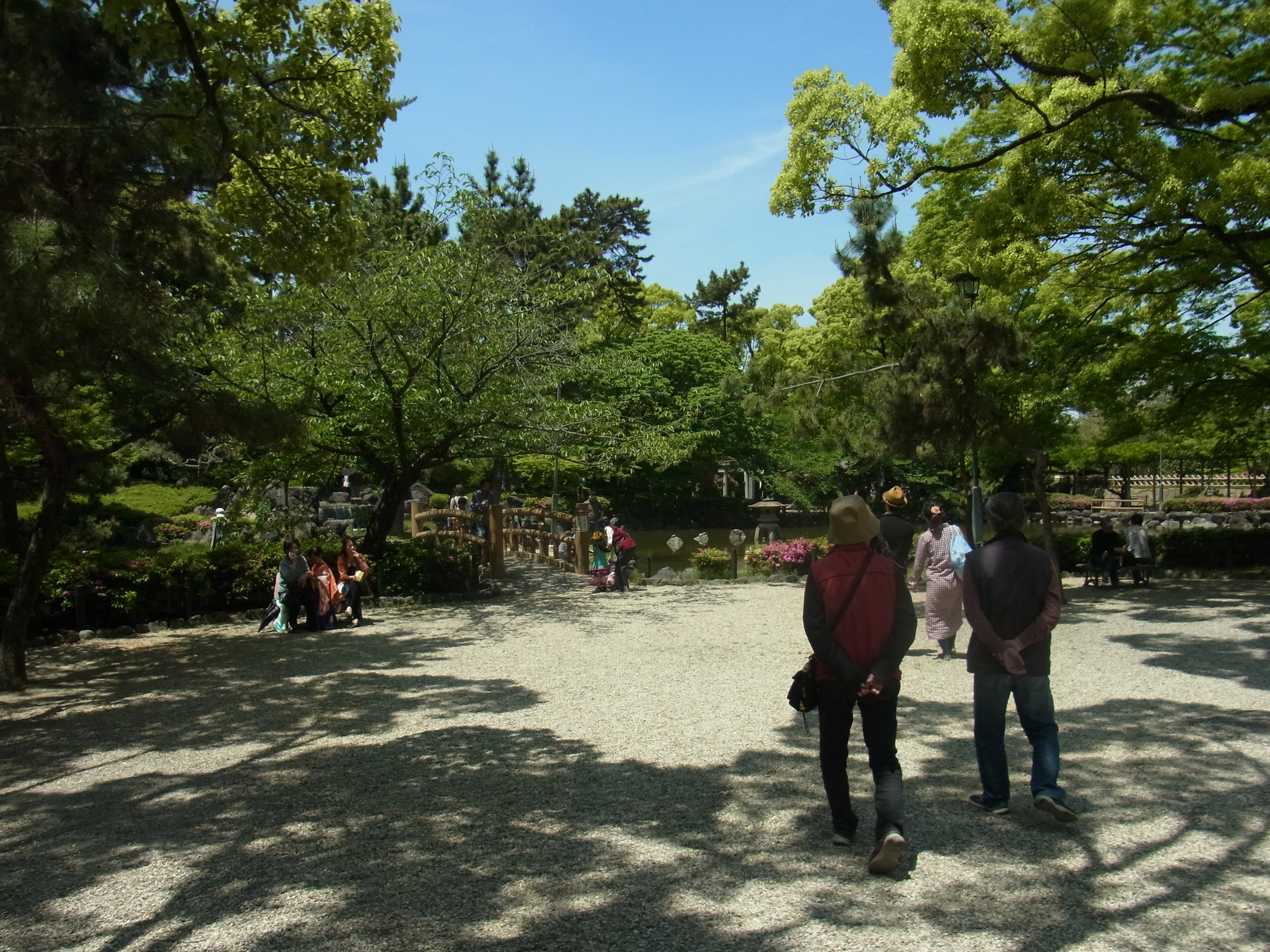 広い公園内